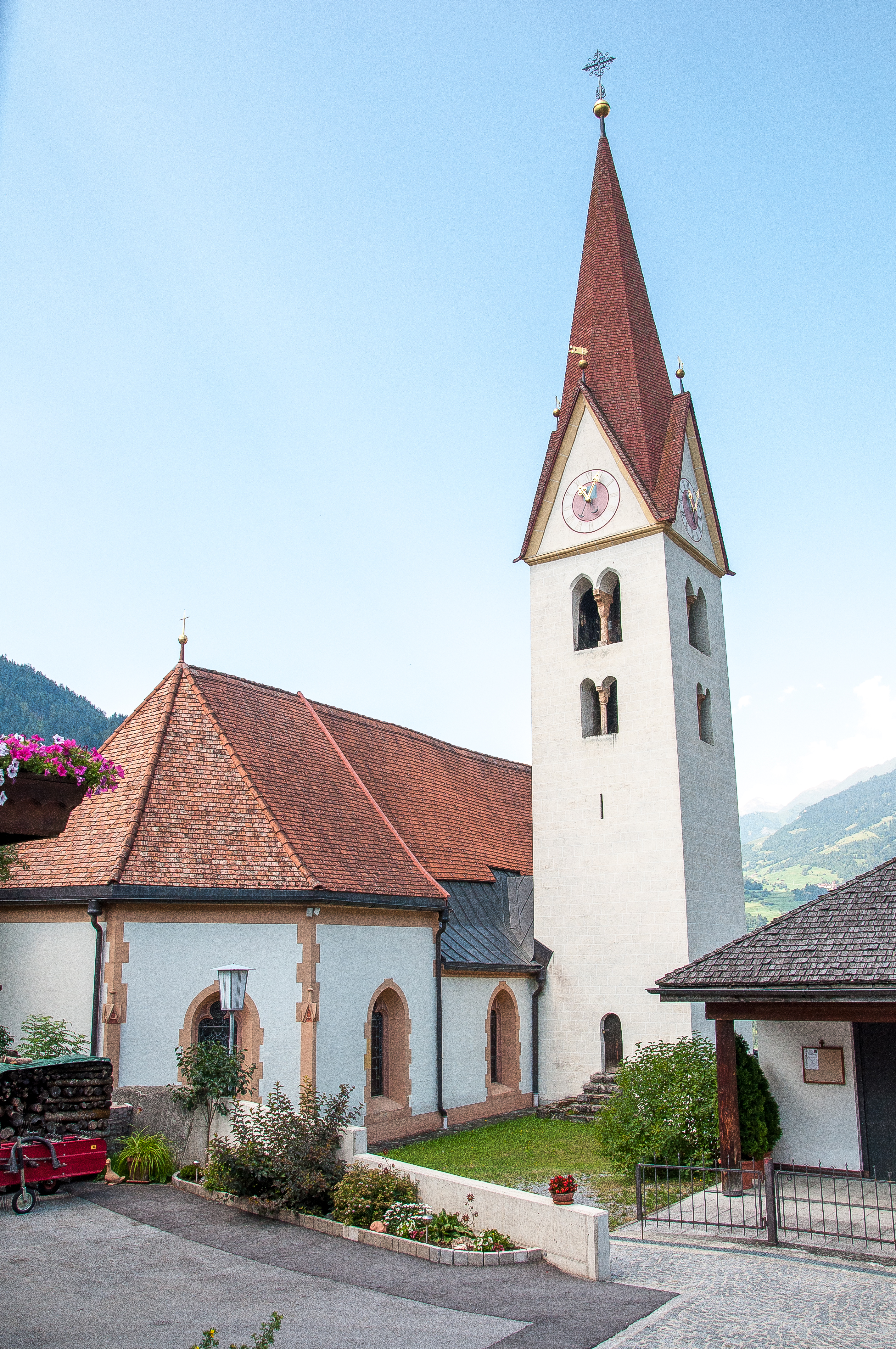 Kath. Pfarrkirche hl. Jakobus d. Ä. und Kriegerdenkmal